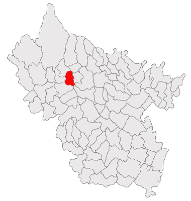 Categorie:Hărţi ale judeţului Buzău